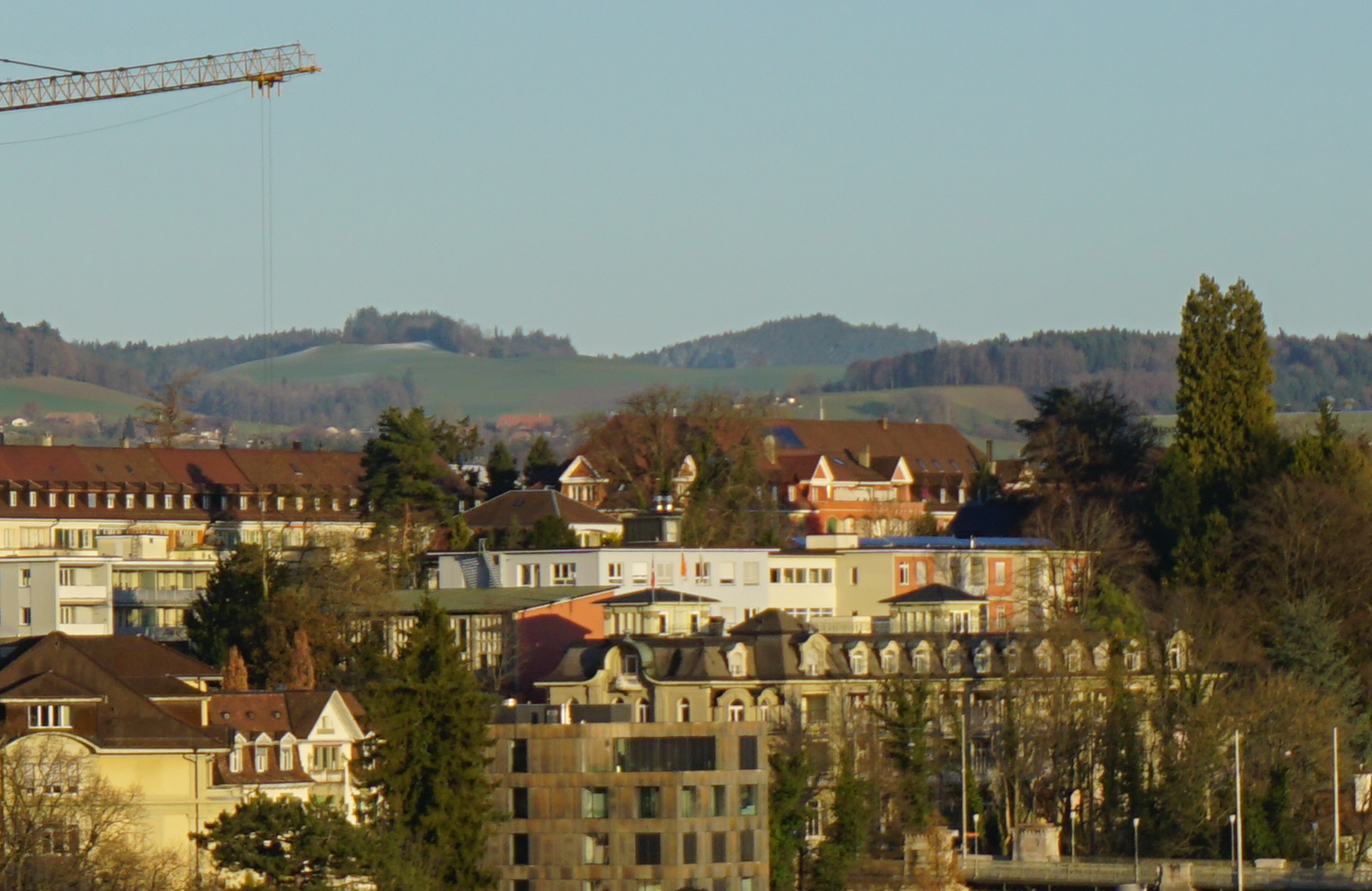 Zentrum Viktoria, Übersicht von der Parkterrasse Bahnhof gesehen. Die Kapelle mit grünem Pultdach und roter Fassade.